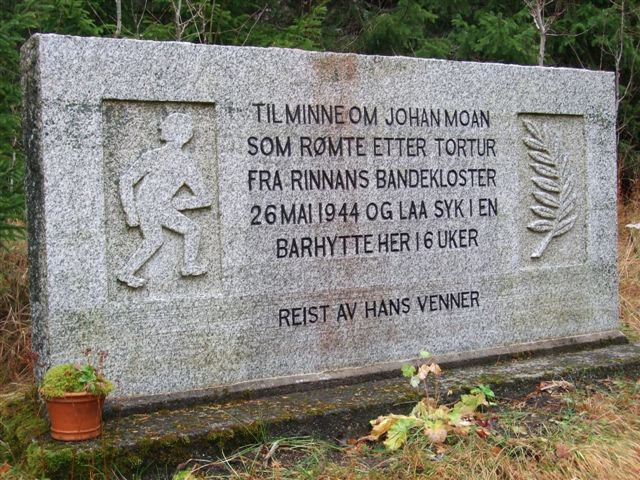 Minnestein over Johan Moan ved Tomset gård i Strindamarka